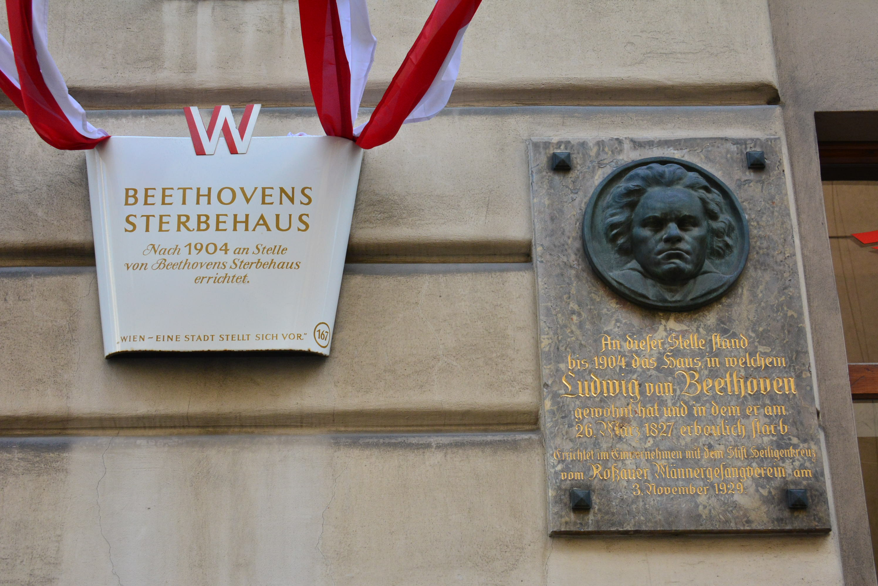 Gedenktafel für Ludwig van Beethoven († 1827)(Wien, Schwarzspanierstraße 15)